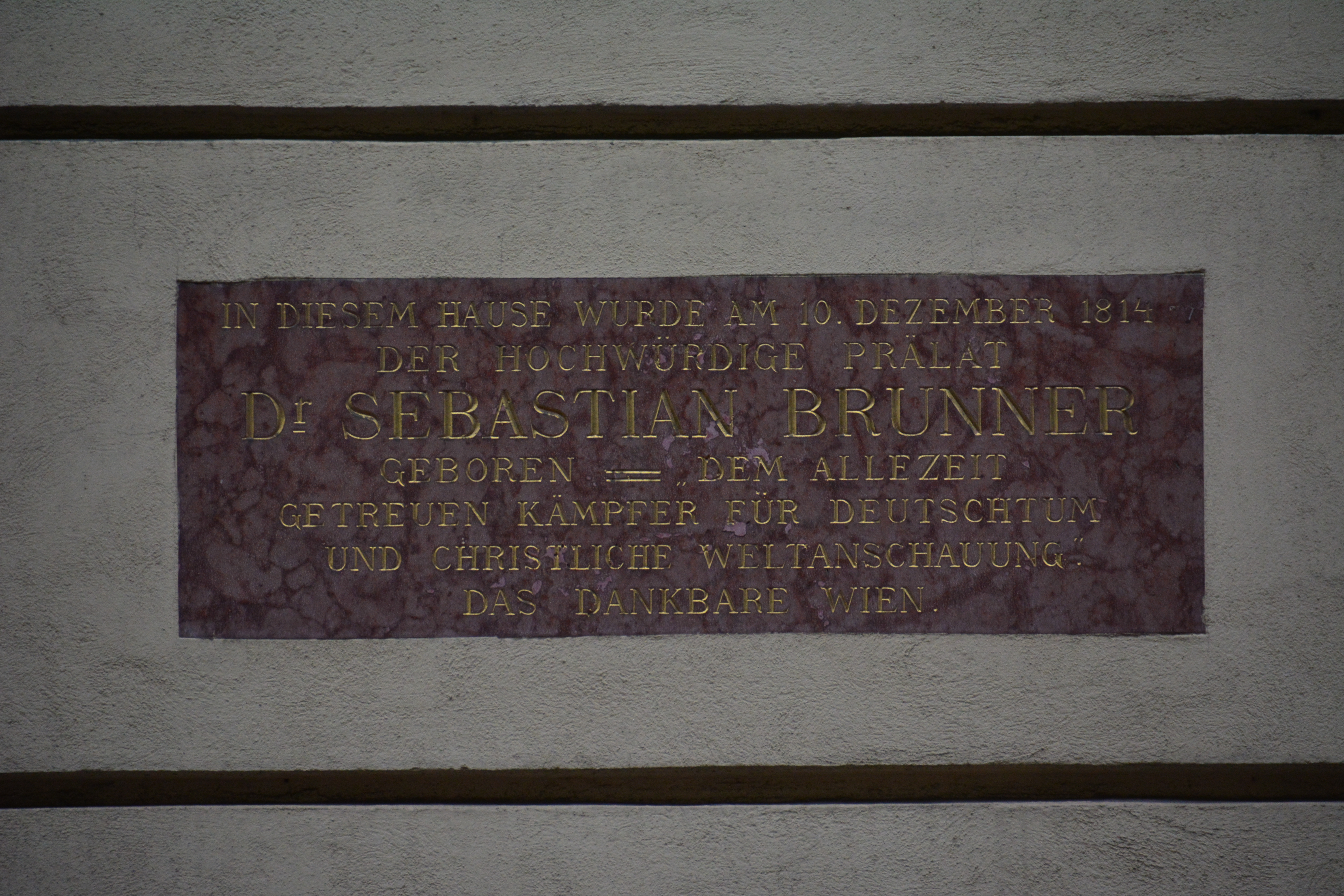 Gedenktafel für Sebastian Brunner (Wien, Kandlgasse 32)